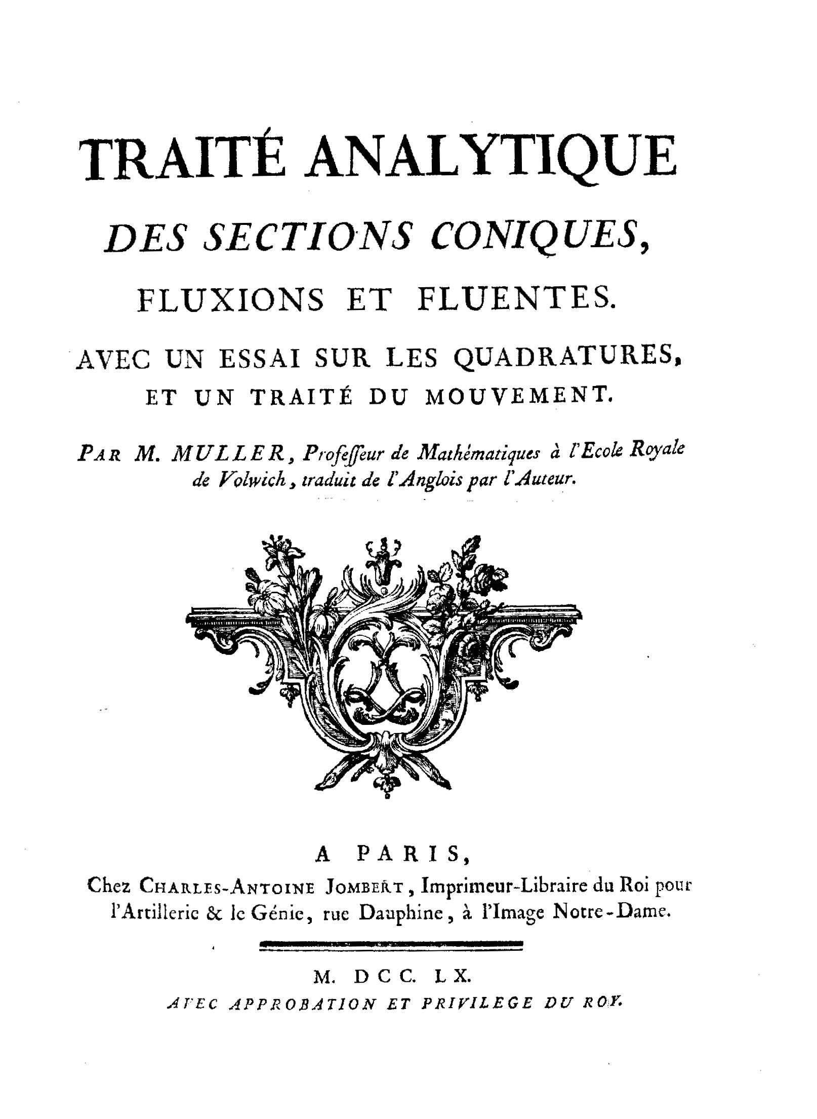 Traité analytique des sections coniques, fluxions et fluentes. Avec un essai sur les quadratures et un traité du mouvement. Par m. Muller, ... traduit de l'anglois par l'auteur. - A Paris : chez Charles-Antoine Jombert, imprimeur-libraire du Roi pour l'Artillerie & le Génie, rue Dauphine, à l'image Notre-Dame, 1760. - IX, [1], 420 p., XVIII c. di tav. : ill. ; 4º .